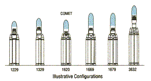 Conestoga rocket configurations